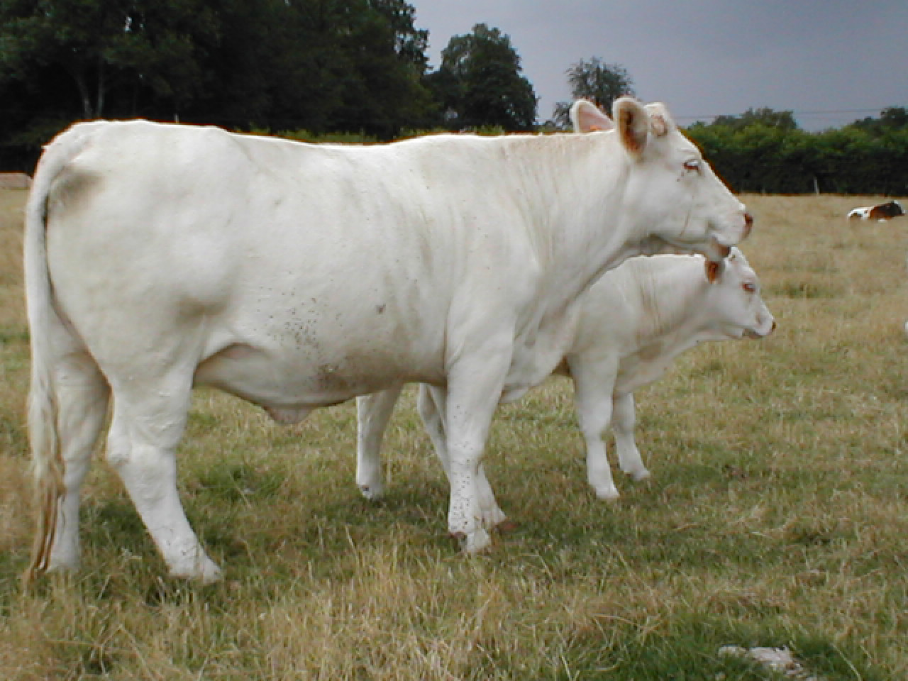 Vache charolaise et son veau. Cette photo a été prise à Diverti'Parc, un parc de loisirs nature en Bourgogne du sud.